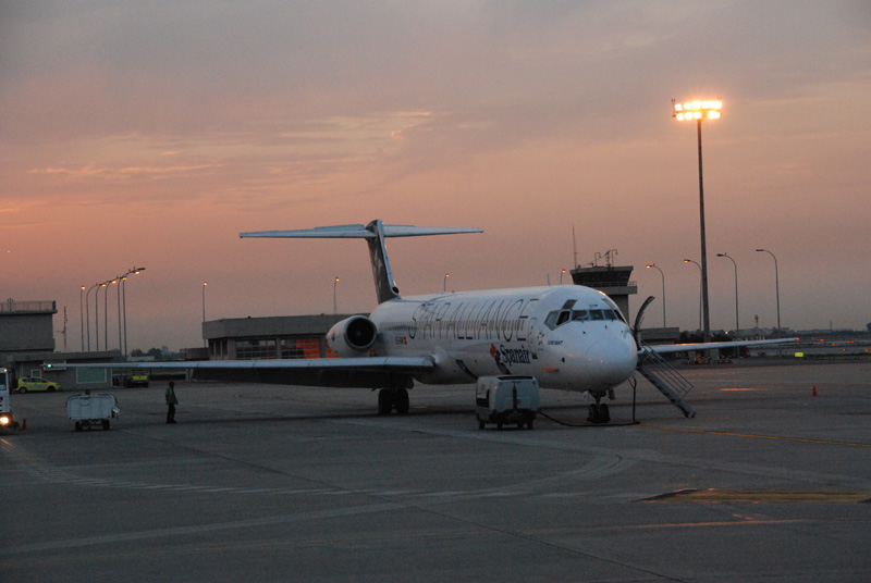 Avión en Aeropuerto Internacional de El Prat (Barcelona)